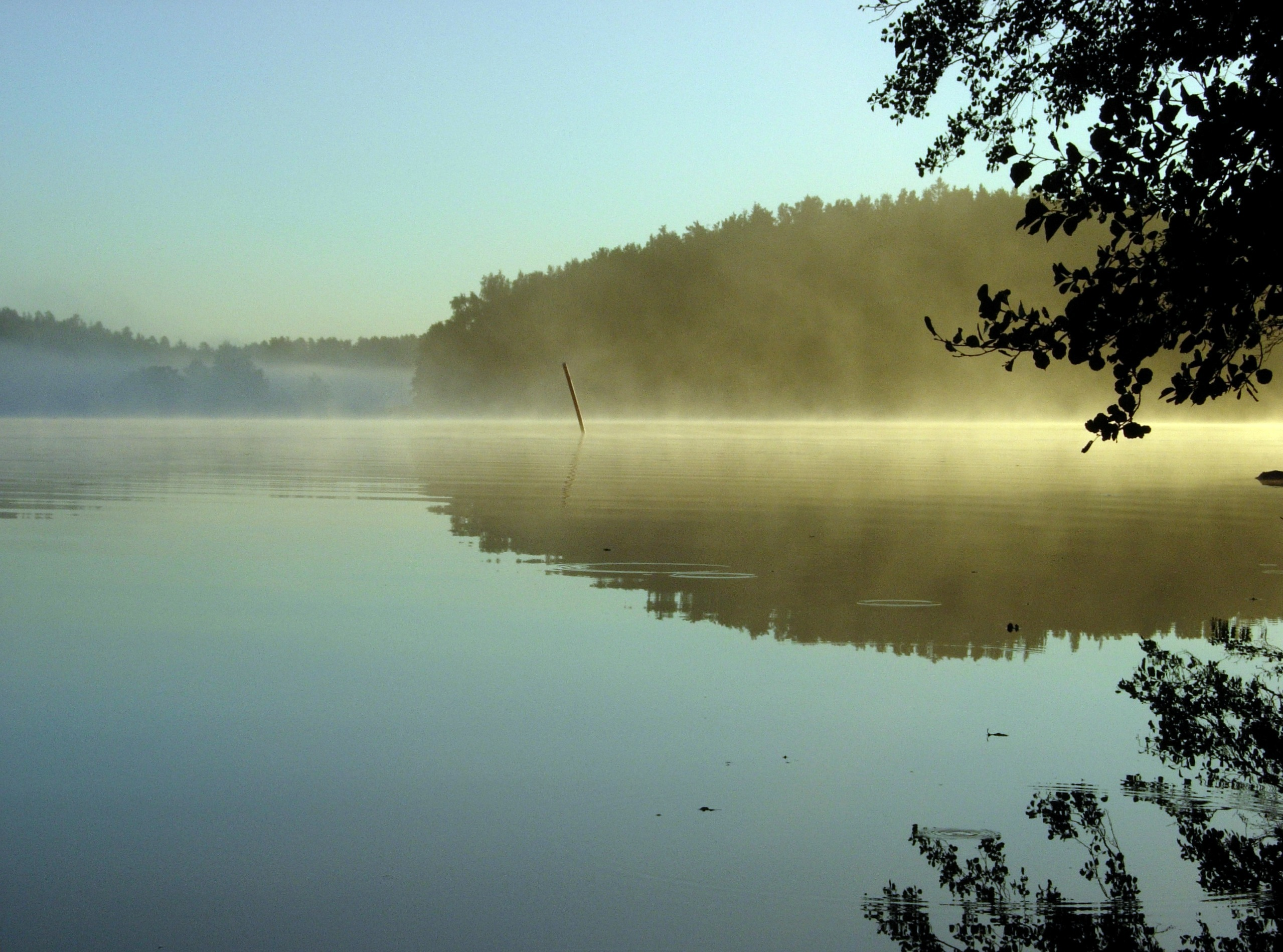 A misty autumn morning at Rymättylä, Finland.